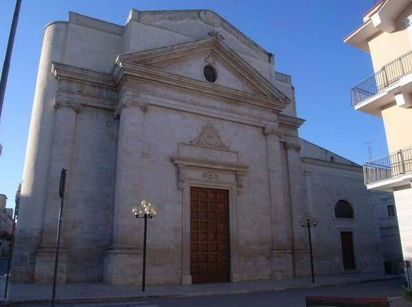 veduta frontale della chiesa S.Maria Assunta